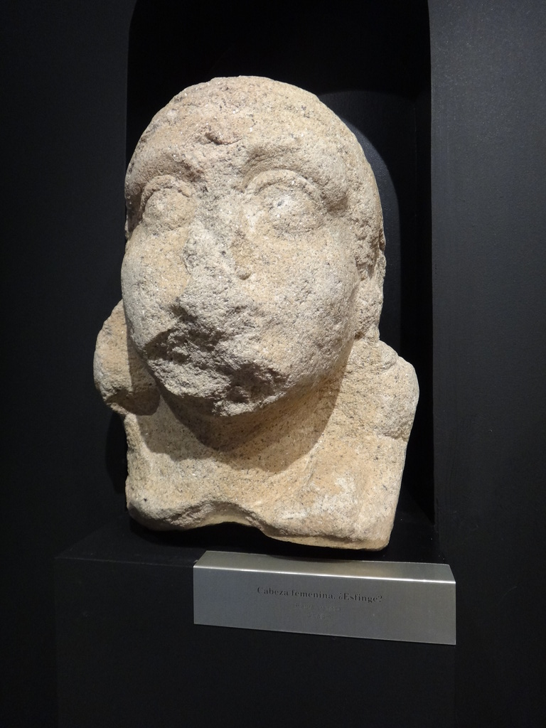 Museo Arqueológico de Jerez de la Frontera (Andalucía, España).